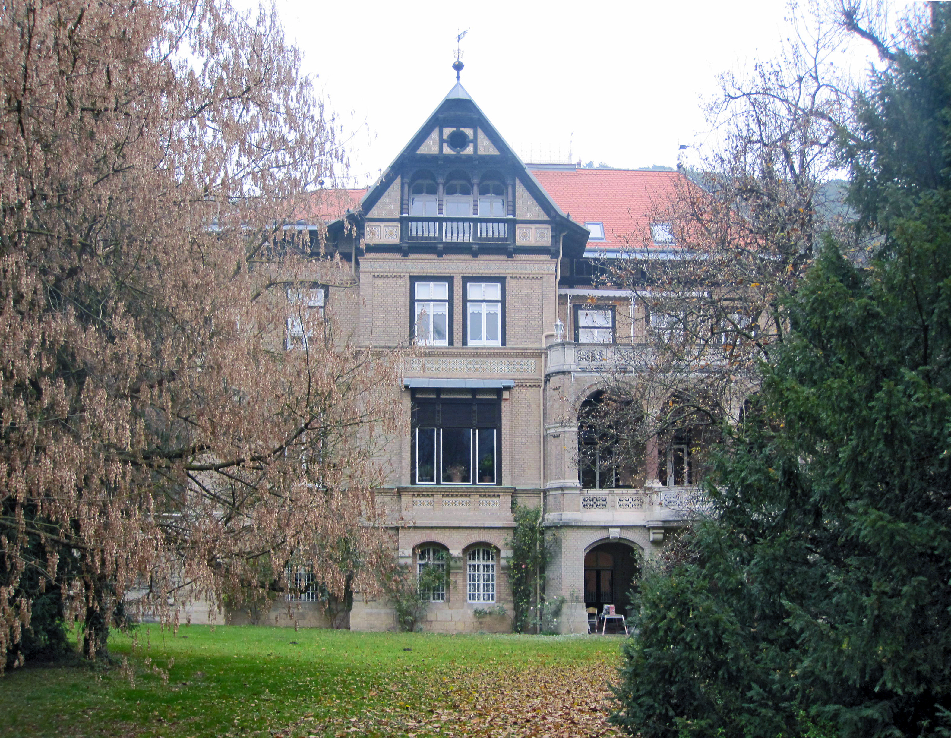 Die Villa Gutmann in Baden bei Wien wurde 1882 von Alexander Wielemans von Monteforte und Hugo Zimmermann (1849–1924) als Sommervilla „nach den Formen der deutschen Renaissance des Mittelalters“ [1] für Wilhelm von Gutmann errichtet. Sie war bis zum Anschluss im Besitz von Rudolf Ritter von Gutmann. [2]. Die arisierte „Villa Gutmann“ war 1944 als Max Merz und Elizabeth Duncan dort wohnten, im Besitz des "Reichsgau Niederdonau". Seither gab es mehrere neue Besitzer. Nähere Informationen zur „Villa Gutmann“ bieten Eva Bergers „Historische Gärten Österreichs: Niederösterreich, Burgenland“ [3] sowie Bettina Nezvals „Villen der Kaiserzeit. Sommerresidenzen in Baden“. Berger (1993). S.125ff. ↑ Zitat Hugo Zimmermann. In: Nezval: „Villen der Kaiserzeit“, S. 126. ↑ Thomas E. Schärf: „Jüdisches Leben in Baden – Von den Anfängen bis zur Gegenwart“ ↑ Eva Berger: „Historische Gärten Österreichs: Niederösterreich, Burgenland“. Böhlau (2002). S125f. ISBN: 9783205993056. Object location48° 00′ 36.47″ N, 16° 12′ 34.42″ E